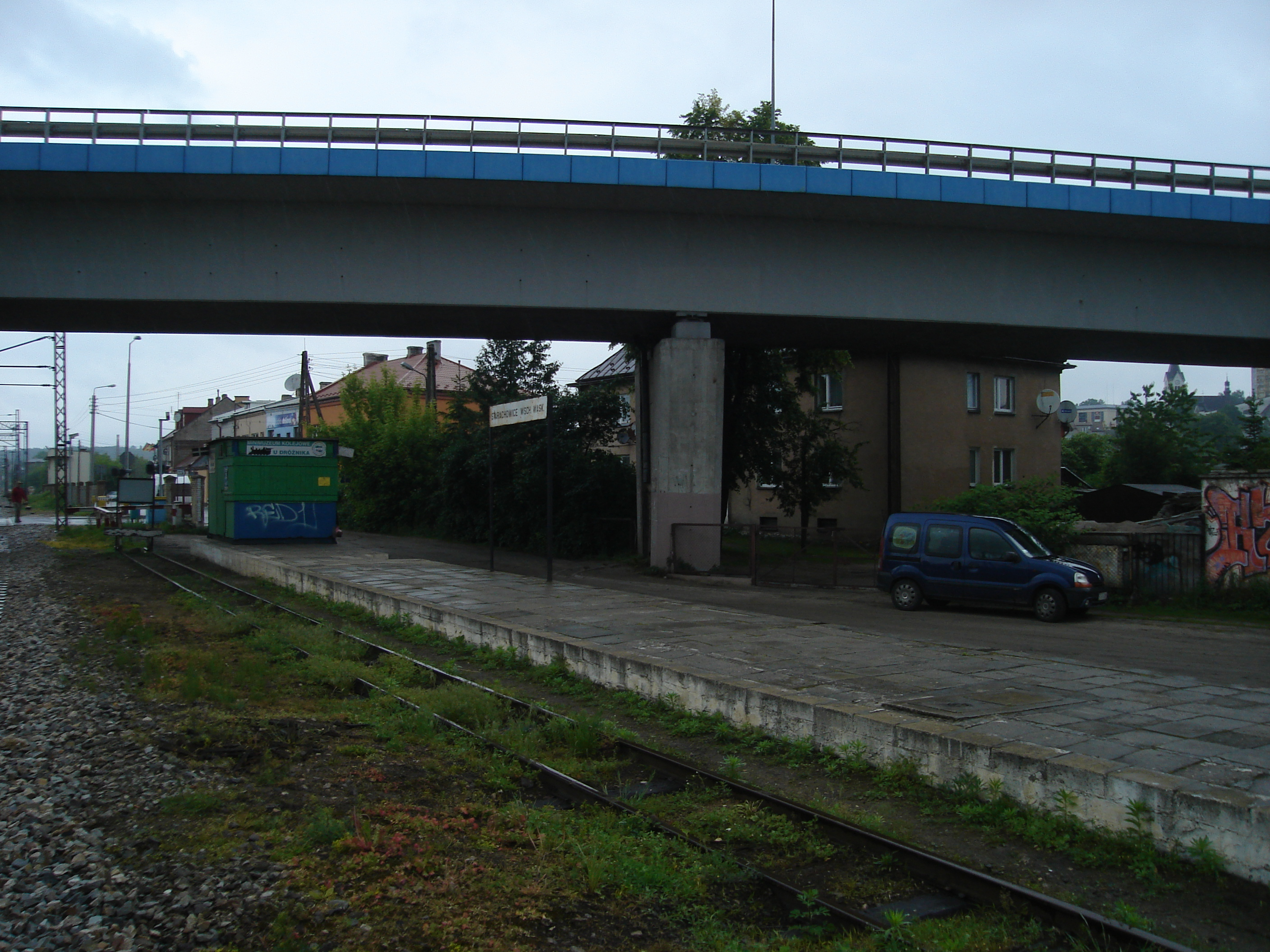 Stacja Starachowice Wschodnie Wąskotorowe